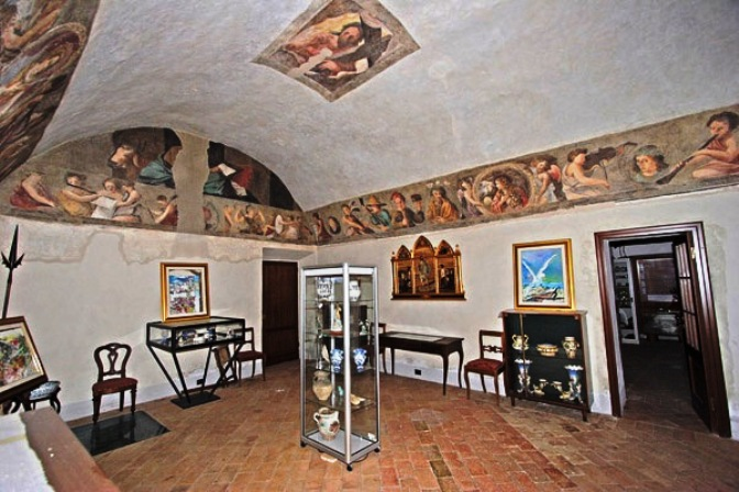 Interno della badia di Torrechiara (Parma).